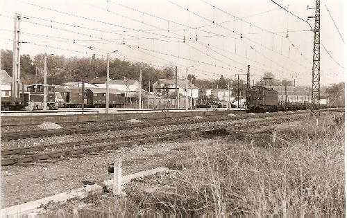 Une BB 4200 à la gare d'Orthez en Septembre 1979